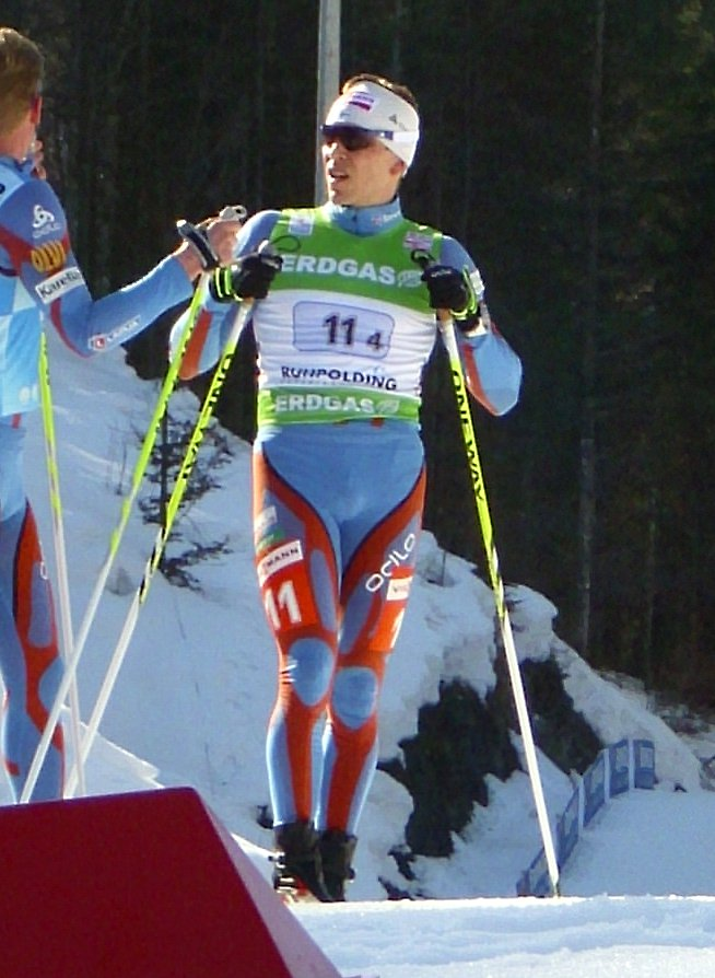 Timo Antila bei der Biathlon WM 2012 in Ruhpolding, kurz vor Beginn der Mixed-Staffel.